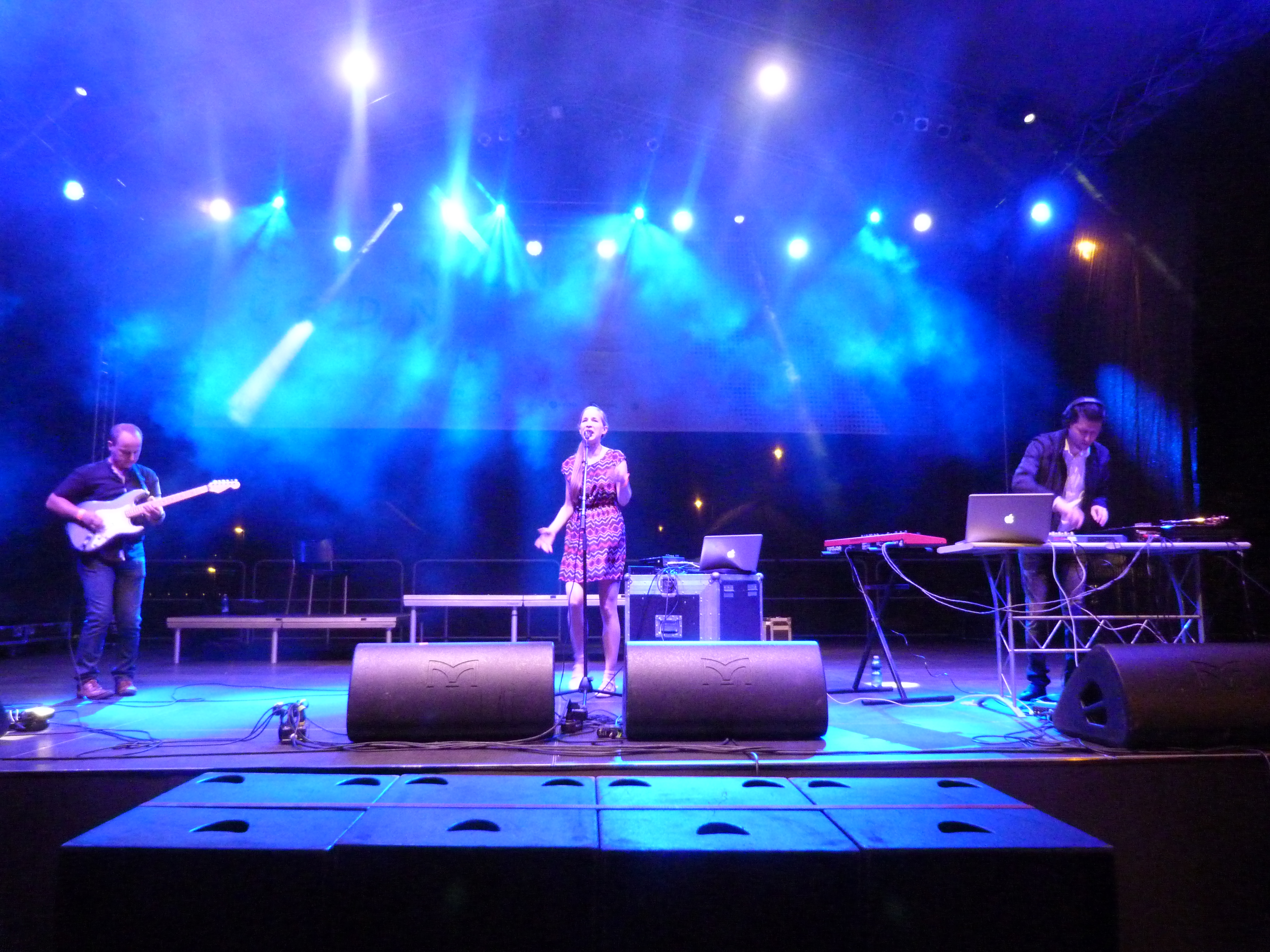 A felvételek 2014. szeptember 6-án szombaton készültek. A Budapesti Műszaki Egyetem főbejárata előtt felállított színpad. Rakpart. 1. Cseh Tamás Nap Újbudán. Bin-Jip zenekar. Harcsa Veronika ének, Gyémánt Bálint gitár, Andrew J. ritmusok, hangminták, scratch). Címkék: 1. Cseh Tamás Nap Hoffmann Tamás polgármester Újbuda 2014 Harcsa Veronika Gyémánt Bálint Andrew J. Jin-Bip jazz alternative rock Timeline Források: Cseh Tamás Nap Újbudán Facebook: A38 Kult11 Egyesület ©© Derzsi Elekes Andor, Budapest 2014, You are authorised to use these photos and vids under Creative Commons – even for commercial, for profit purposes. Photos must be attributed to Derzsi Elekes Andor. All of the photos and vids in the Metapolisz DVD line are under Creative Commons and can be used even for commercial – for profit – purposes. Recommended Citation Derzsi Elekes Andor: Metapolisz DVD line